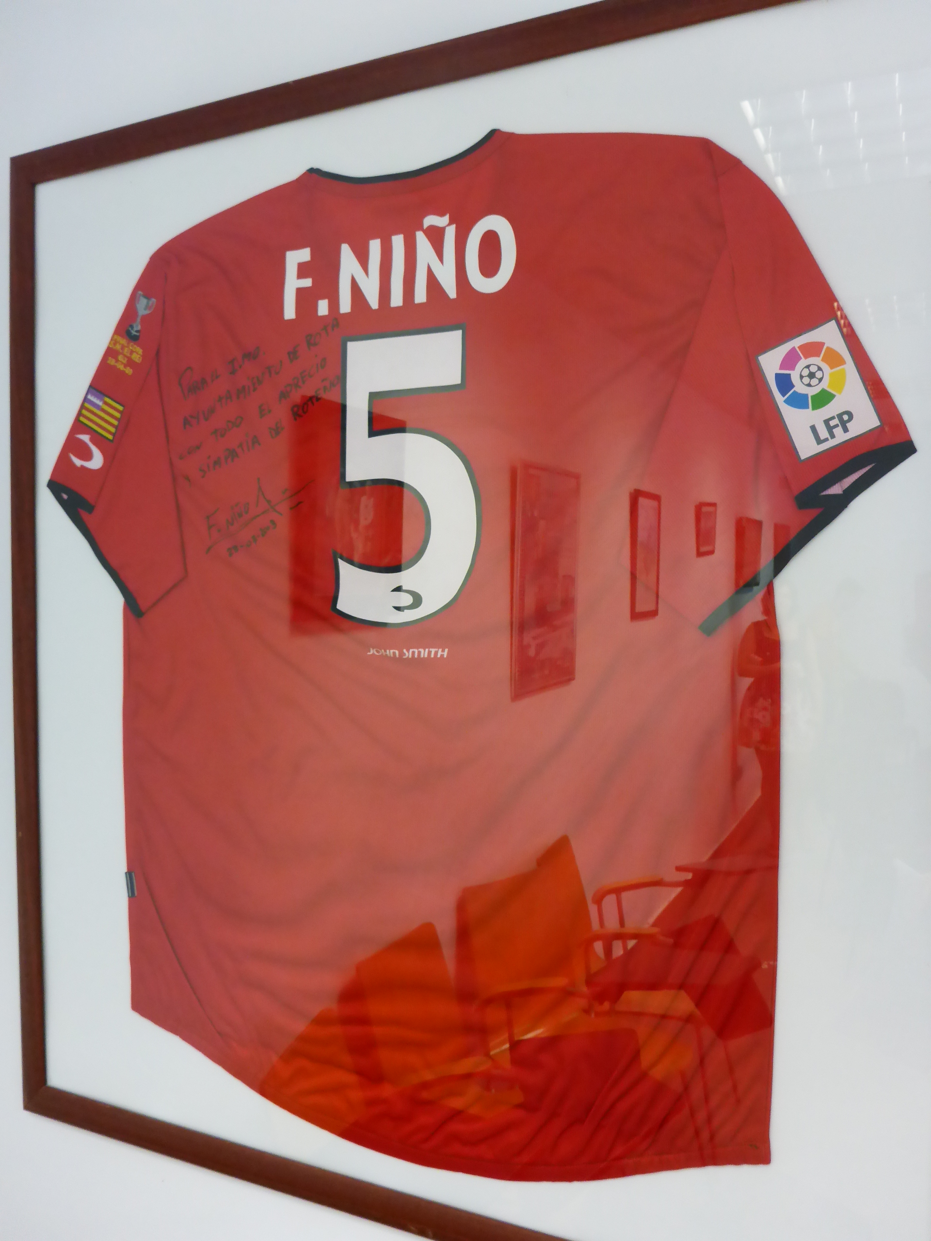 Camiseta de Fernando Niño Bejarano firmada en el Polideportivo de Rota (España)